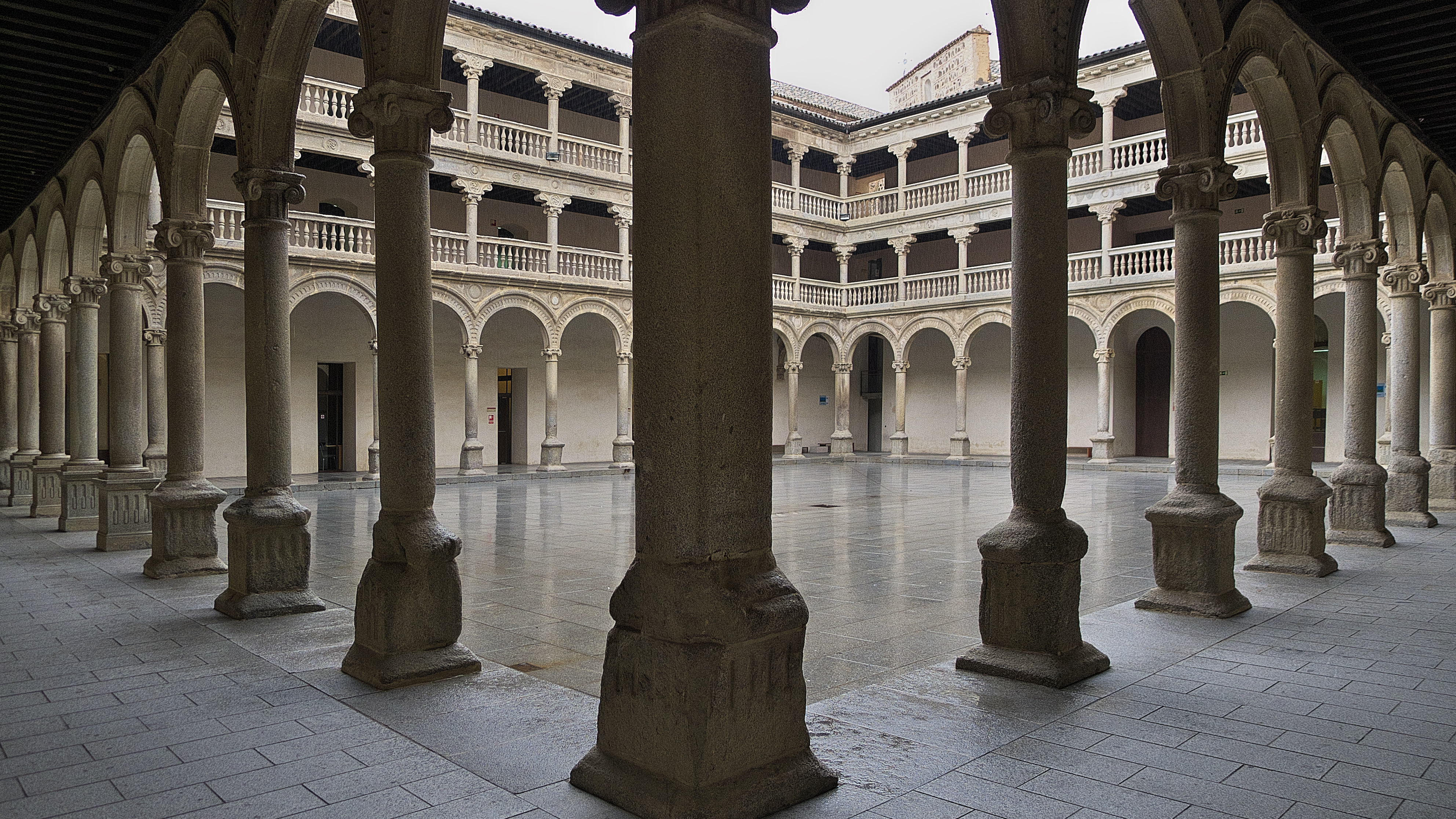 Claustro principal de los dominicos. Una importante obra renacentista proyectada por Alonso de Covarrubias (1541) y ejecutada en piedra por Hernán González de Lara.